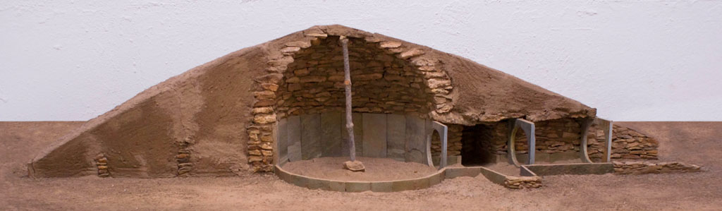 Maqueta de una de las tumbas características del poblado prehistórico de Los Millares (Santa Fe de Mondujar, Almería, España)